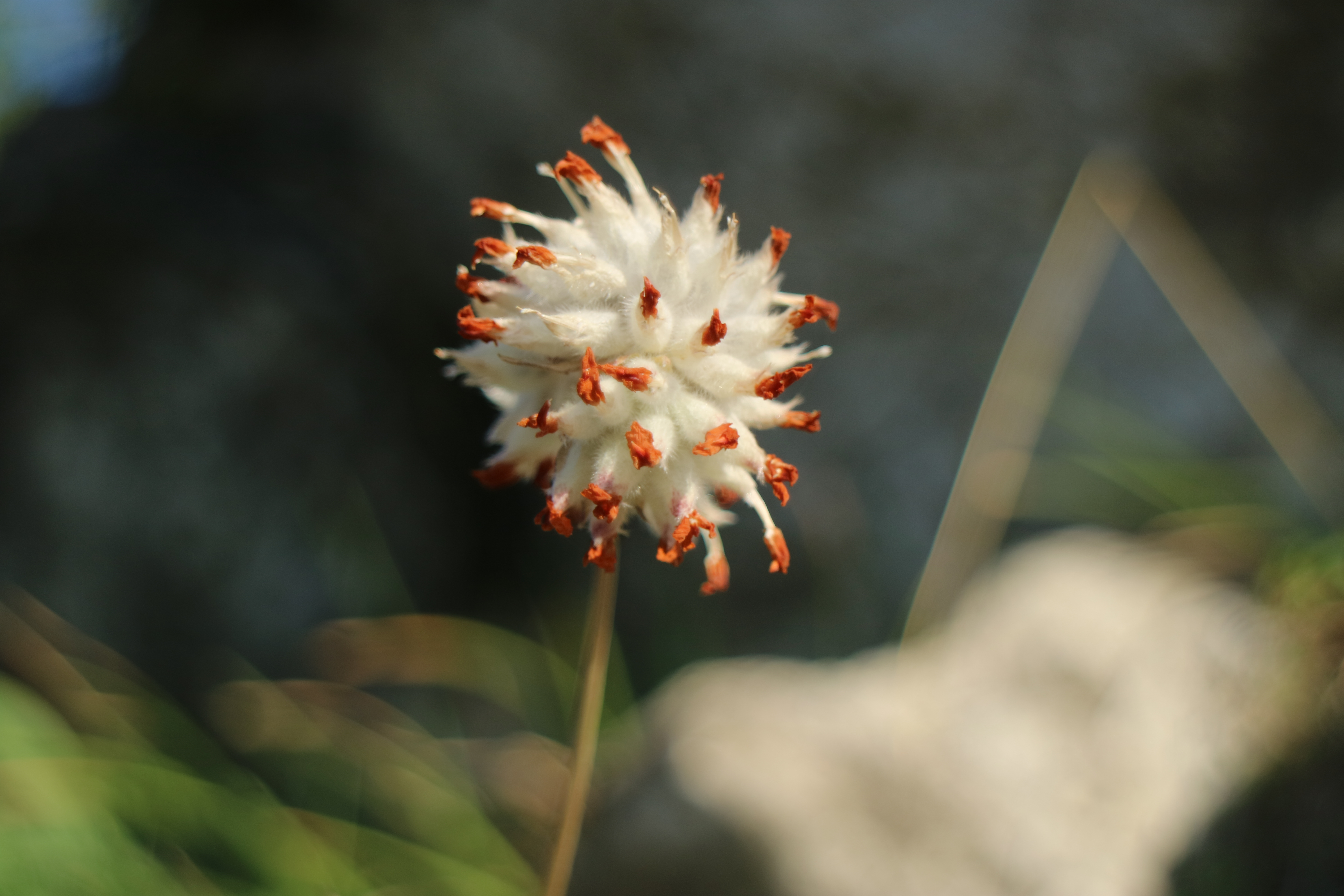 Alpen-Wundklee (Anthyllis vulneraria susp. alpestris) am Jungfernsprung bei Gösting, Graz